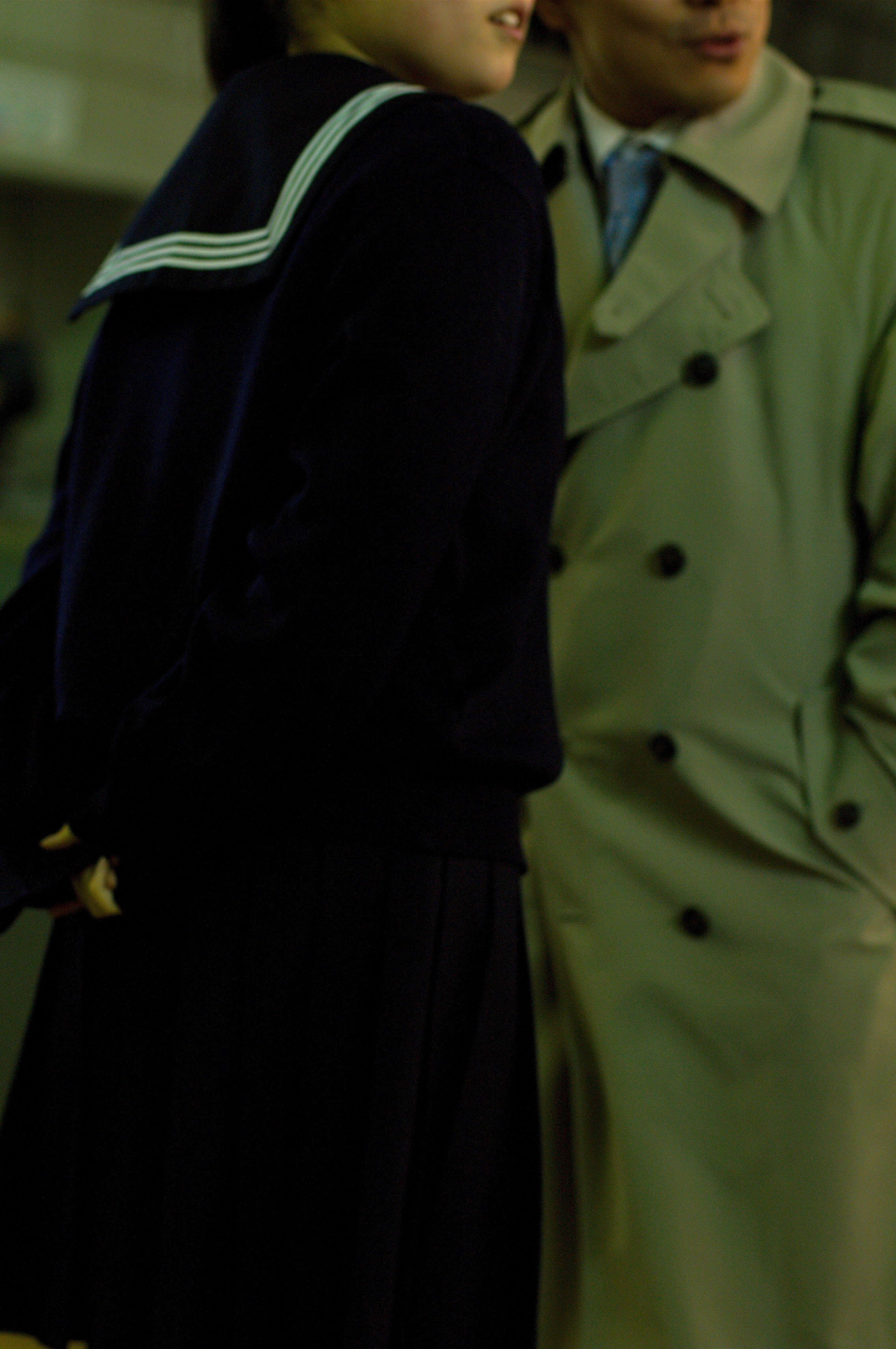 おそらく父娘